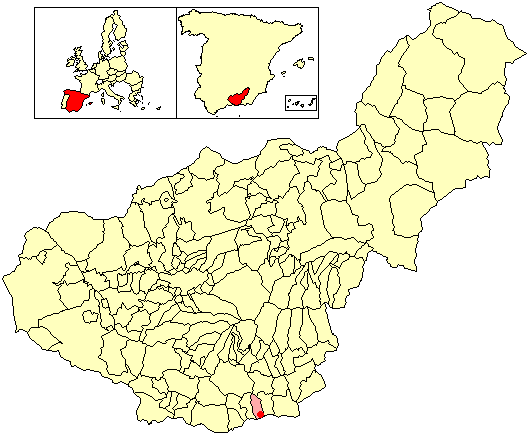 Situación de la localidad de La Mamola (en el municipio de Polopos) respecto a la provincia de Granada, en España.